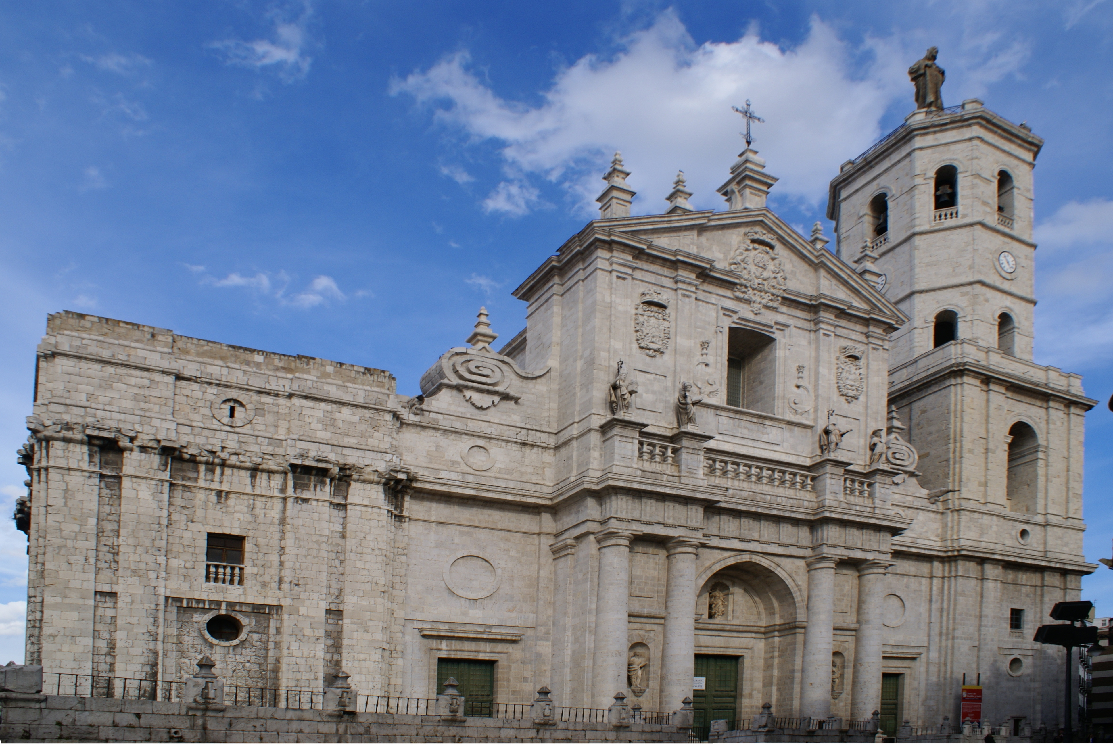 Valladolid – España (Spain) - Catedral Se debió de empezar a construir hacia el año 1580 según los planos de Juan de Herrera, cuando este abandonó su construcción, esta fue continuada por Pedro de Tolosa, Diego de Praves y por su hijo Francisco de Praves. Se inauguró en 1668 y aunque durante el siglo XVIII se continuaron las obras, la construcción quedó inacabada, sin llegarse a terminar el proyecto de Juan de Herrera. La torre fue levantada en 1841